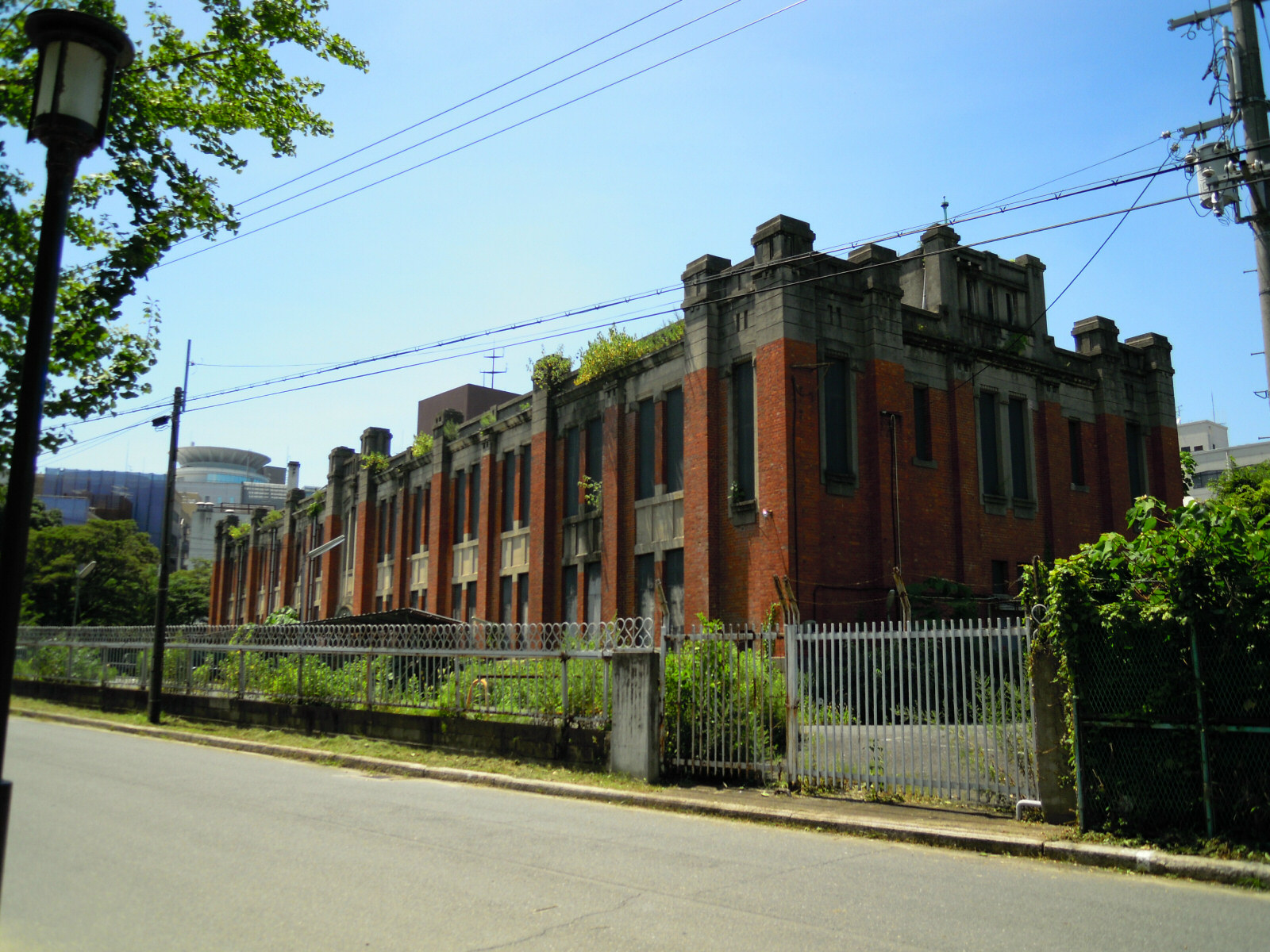 Osaka Castle Park